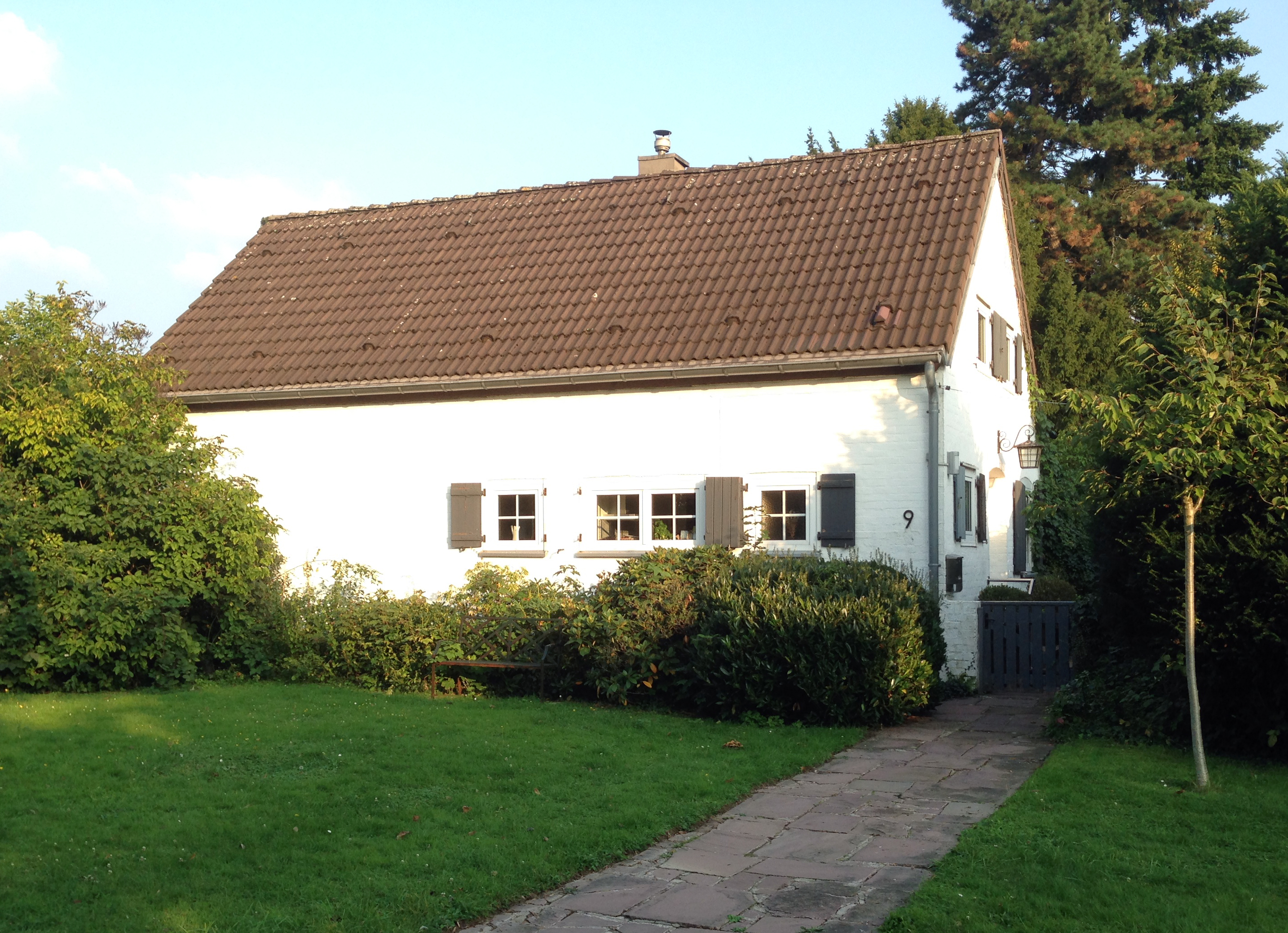 Haus Franz-Jürgens-Straße 9, Düsseldorf-Golzheim